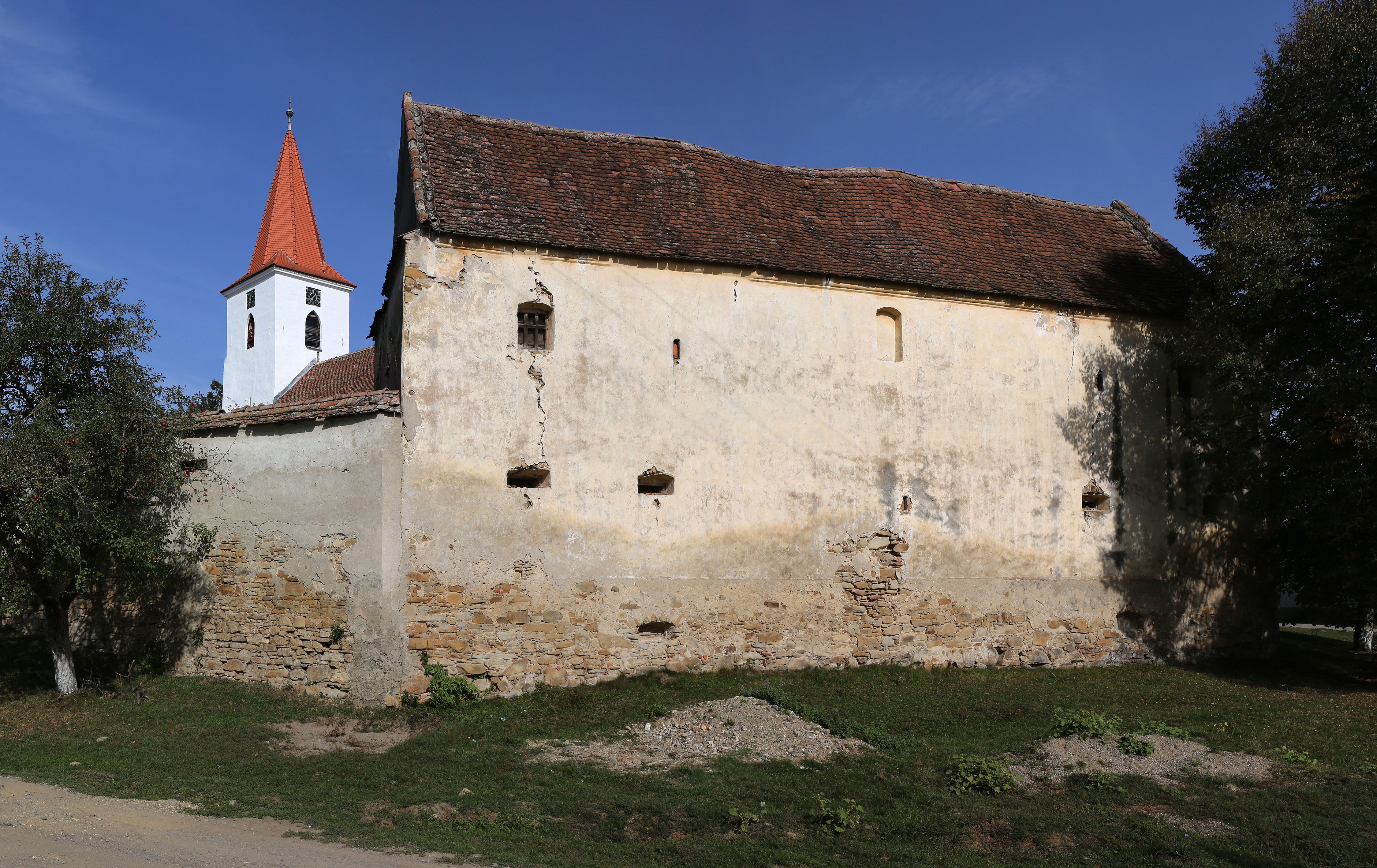 Ansamblul bisericii evanghelice fortificate 02